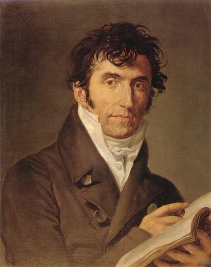 "Ritratto di Gaetano Cattaneo, olio su tela, 59.5 x 45.5 cm, Pinacoteca di Brera, Milano